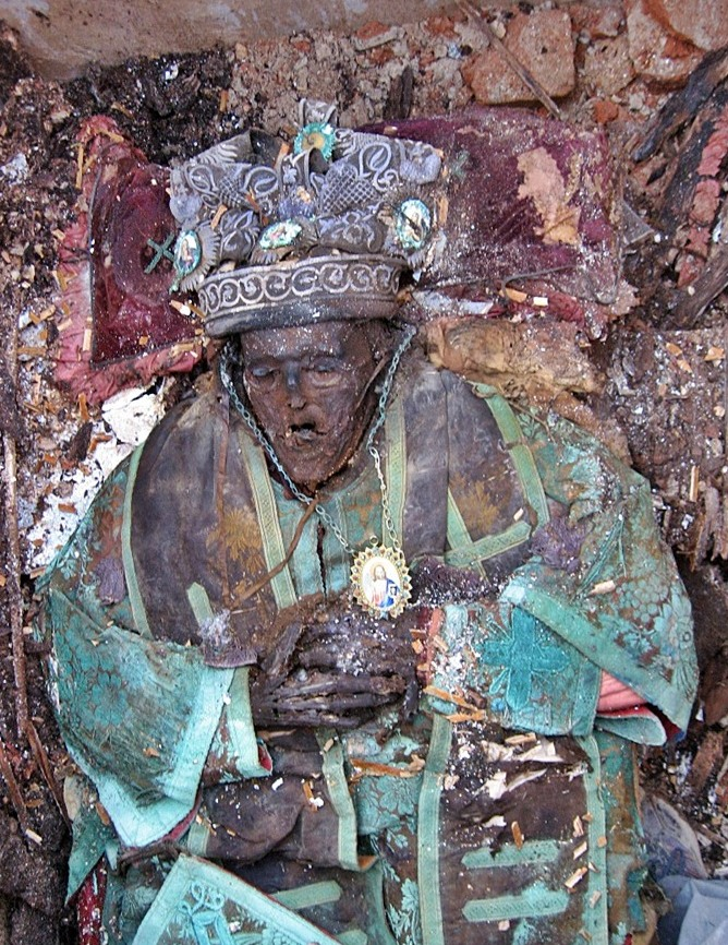 Леонтије Радуловић (1835-1888), митрополит херцеговачко-захумски. Опис: Мошти откривене 13. новембра 2009. у Саборној цркви у Мостару Извор: Дозвола: овде